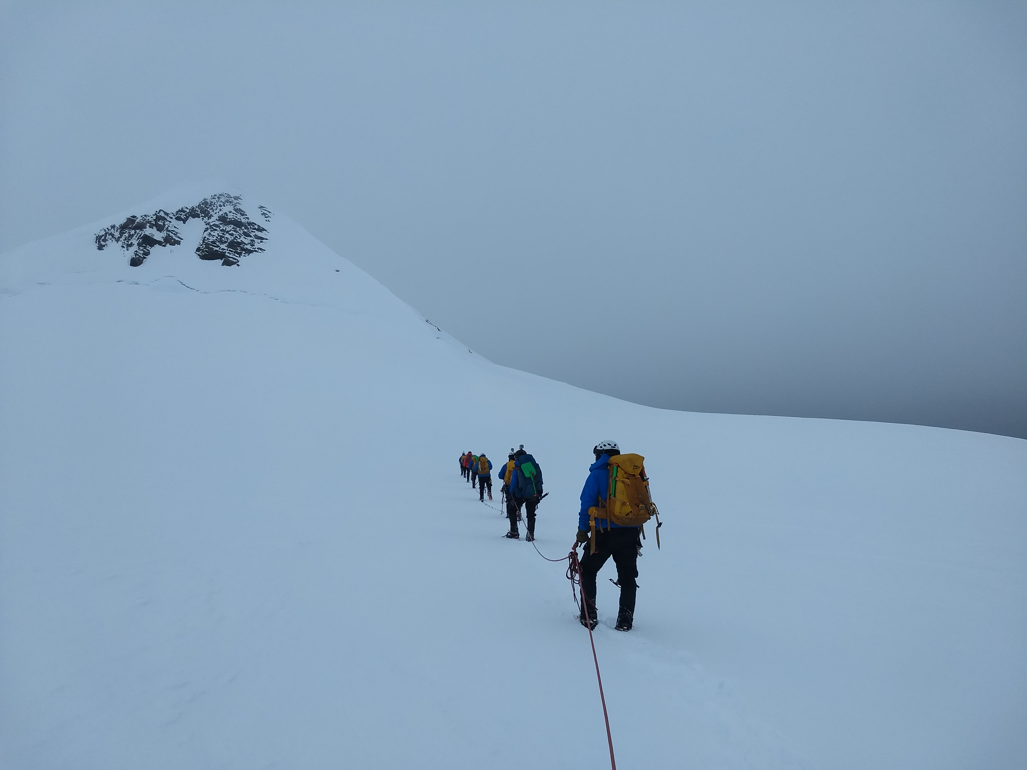 ASCENT TO MONTE JACQUINOT 2019